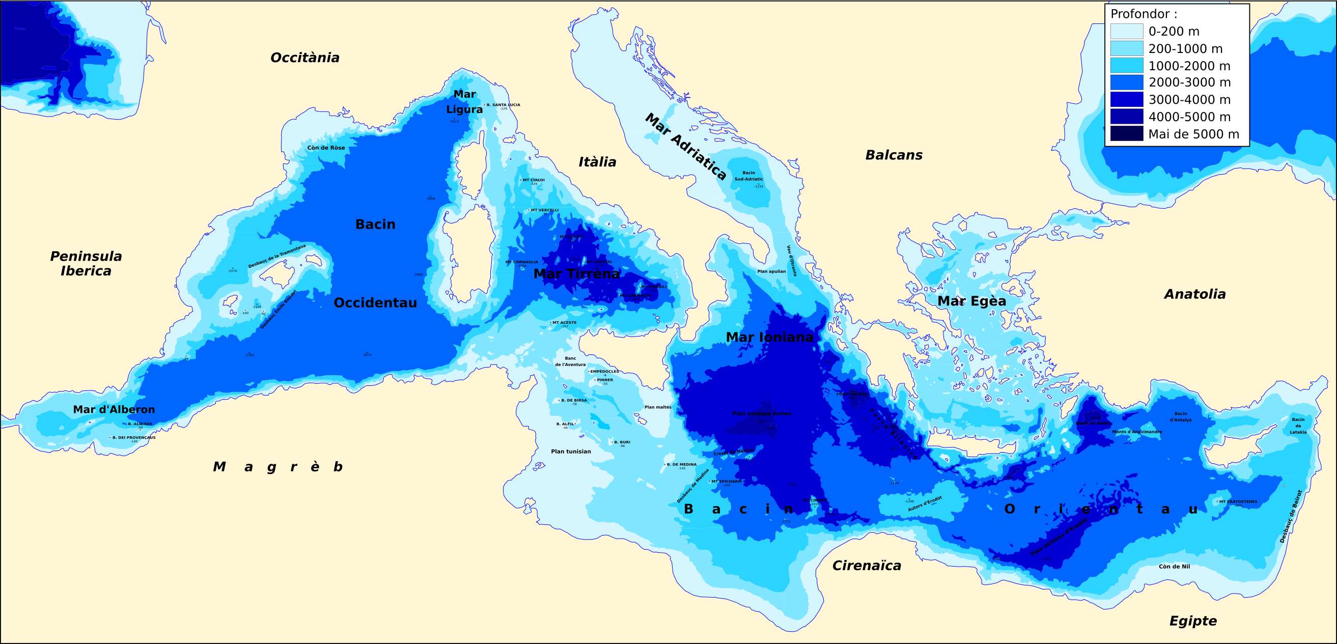 Topografia de la Mar Mediterranèa.